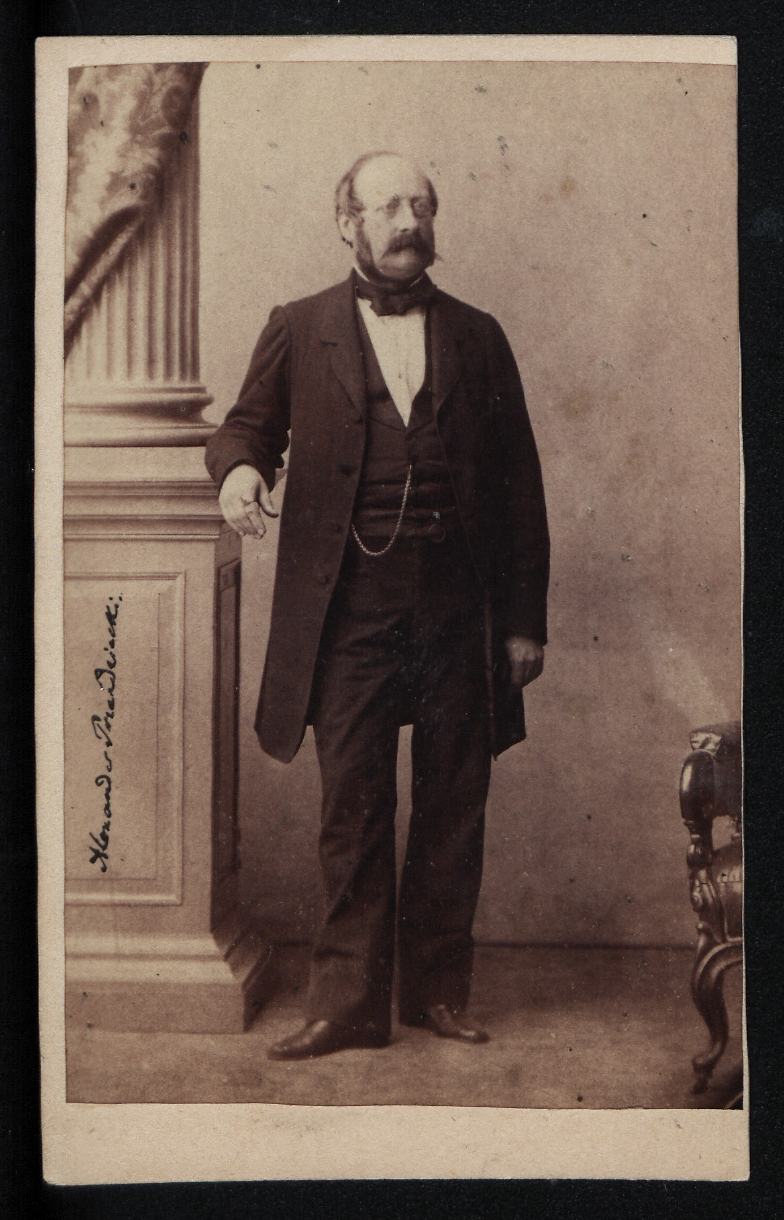 Historyk Aleksander Przeździecki, 1860 r.